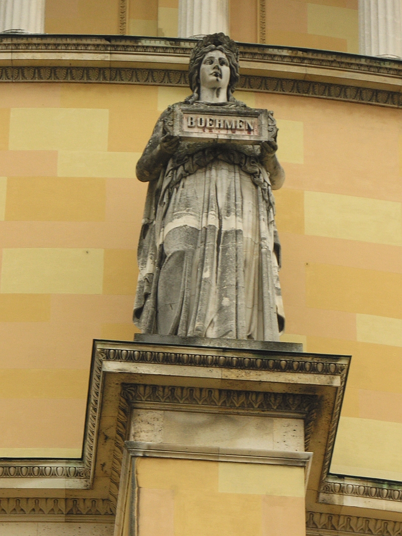 Diese Statue an der Aussenseite der Befreiungshalle in Kelheim steht für den Volksstamm aus Boehmen (Schreibweise beachten), Höhe der Statue 580 cm. Sie ist eine von 18 Statuen, die nach Modellen des Bildhauers Johann Halbig geschaffen wurden.